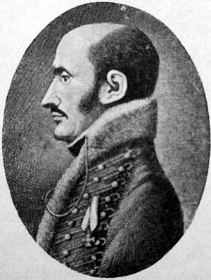 Mecséry Dániel huszár altábornagy, az Udvari Haditanács tagja, valóságos belső titkos tanácsos, a Katonai Mária Terézia Rend tiszti keresztjének, az Arany Polgári Érdemkereszt kitüntetettje és a császári királyi 2. számú huszárezred másodtulajdonosa. „A legkeményebb fejű magyar”